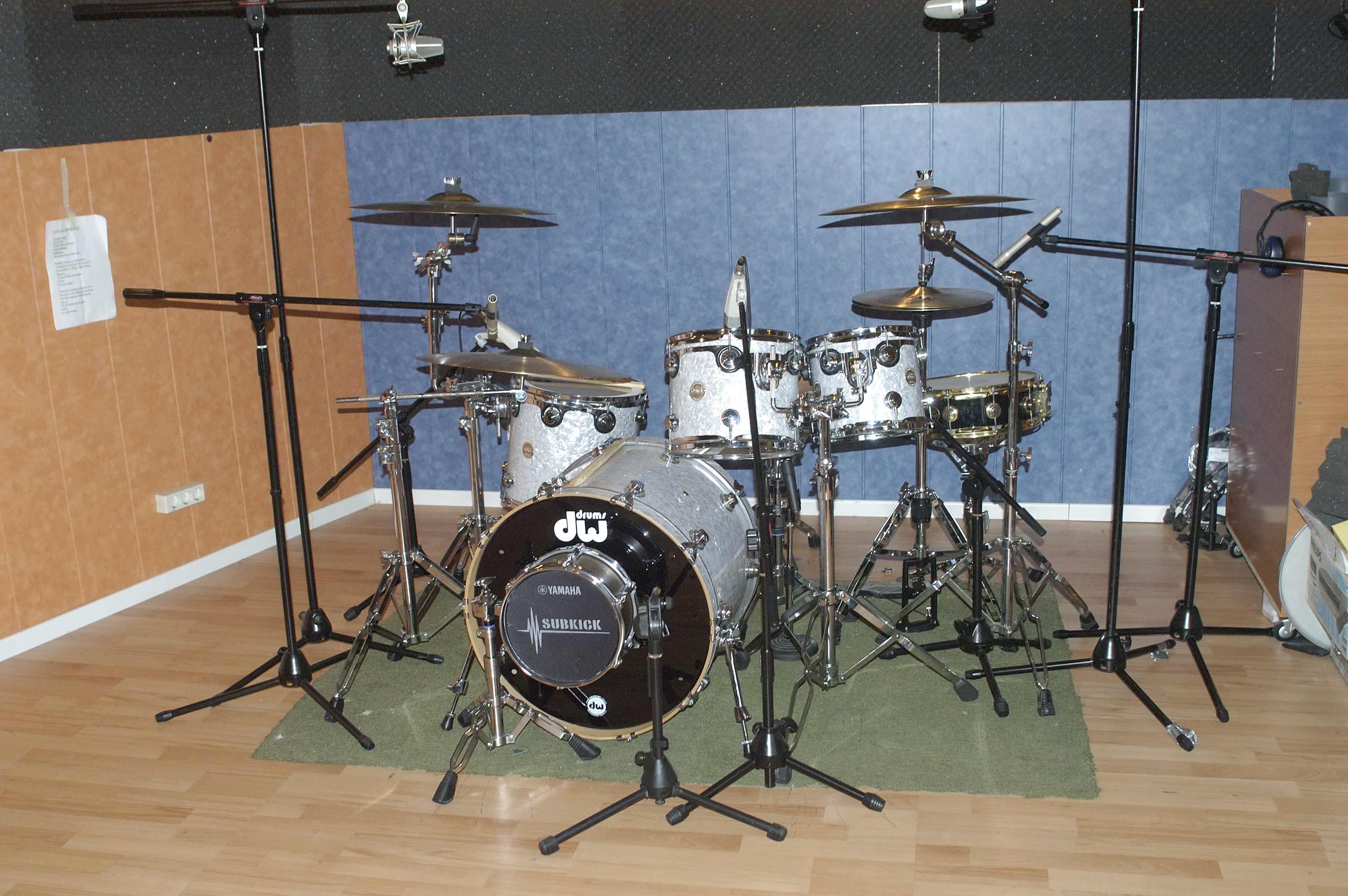 Fotografia de una batería en un estudio de grabación